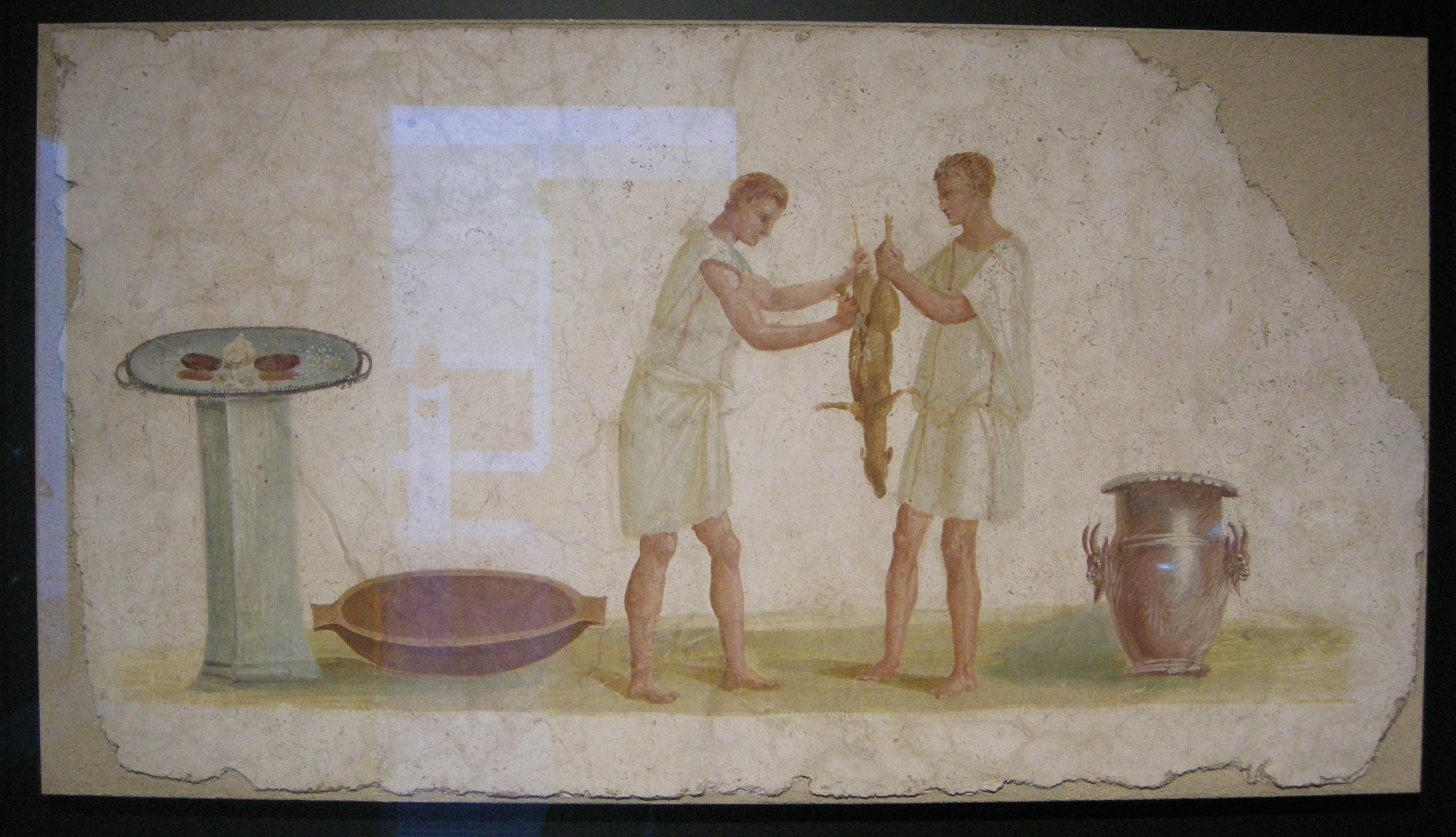 Arte romana, affresco frammentario con scena di preparazione della carne, 50-75 ca.